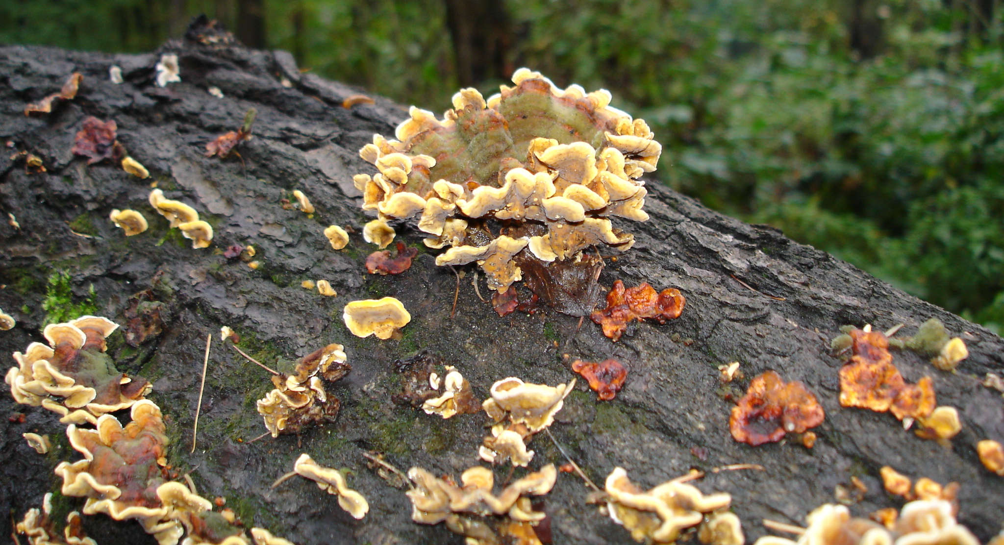 Striegeliger oder Zottiger Schichtpilz (Stereum hirsutum)